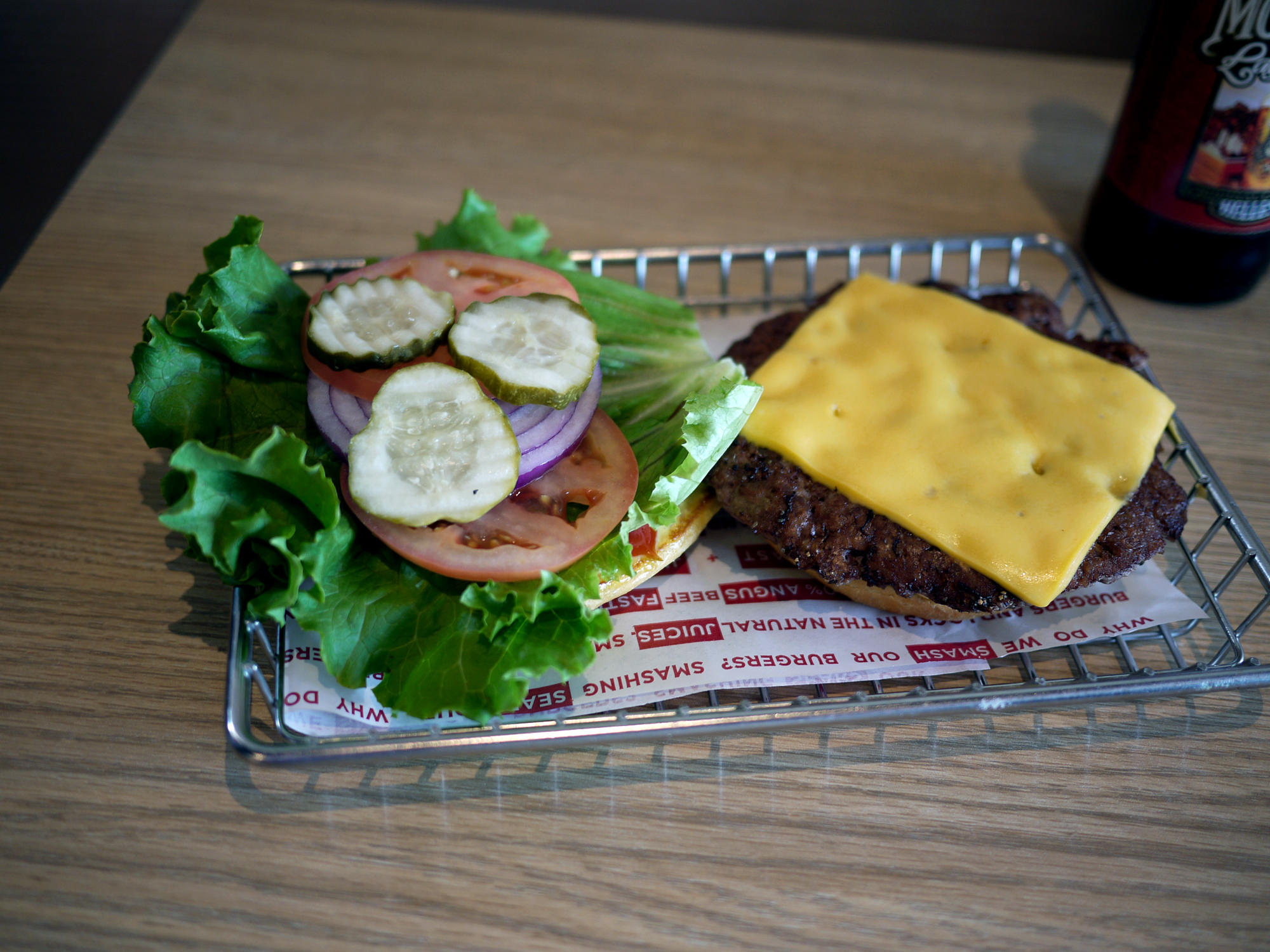 Smashburger